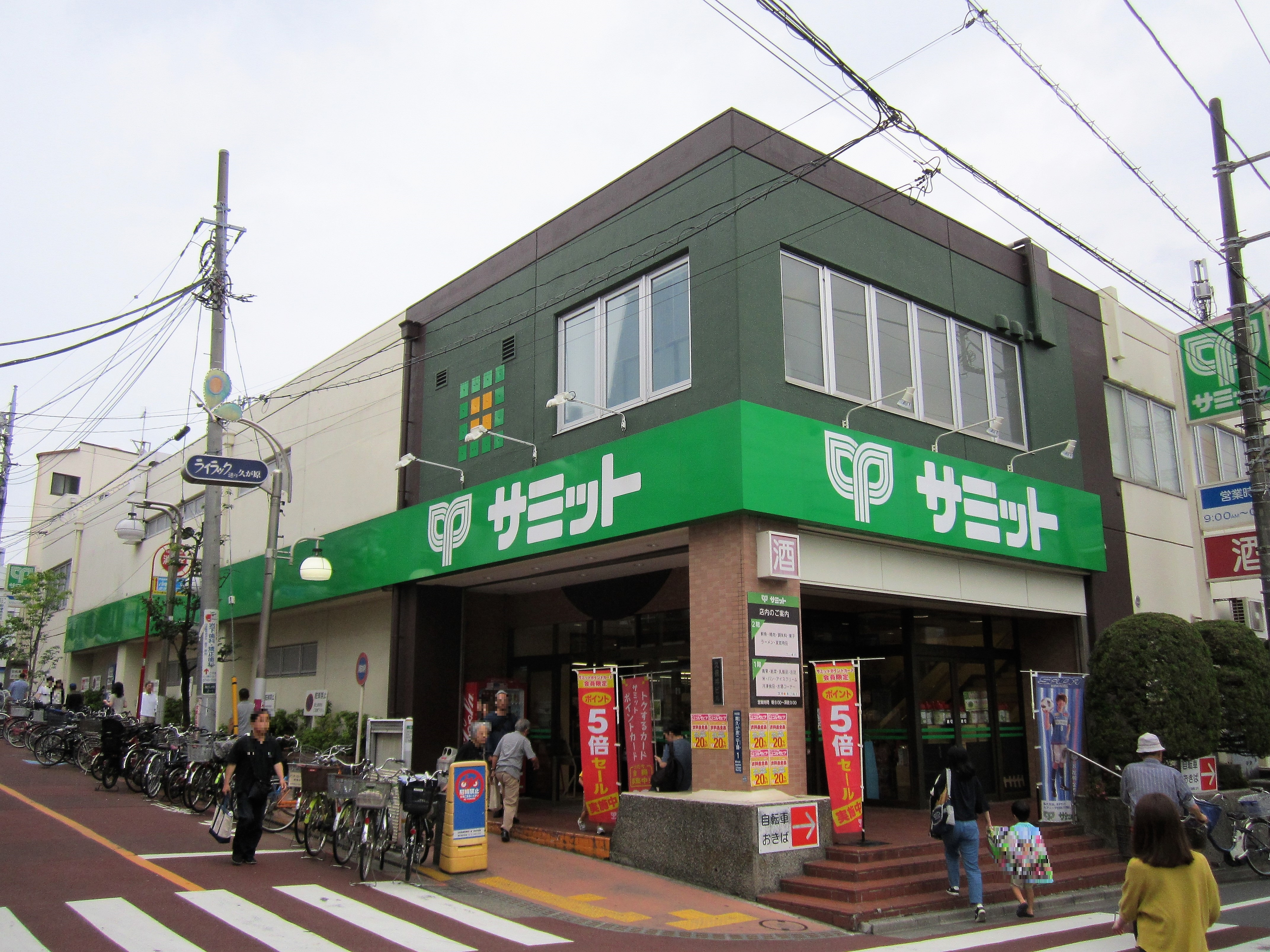 サミットストア 久が原店食品館（大田区南久が原）